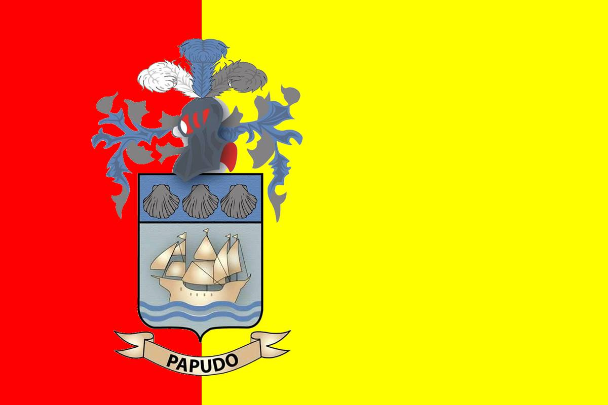 Bandera de la comuna de Papudo - Chile